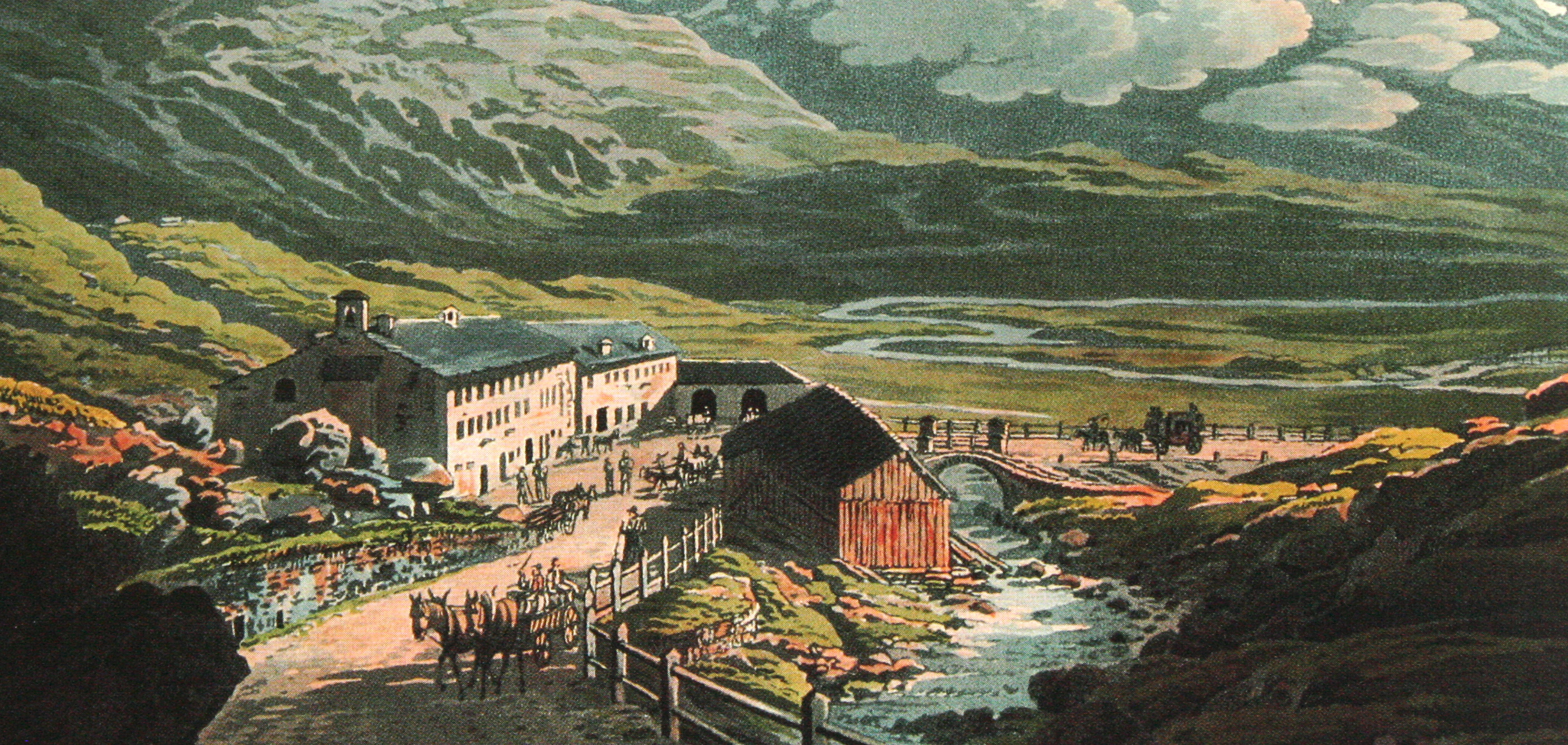 Montespluga 1823, Aquatinta von Johann Jakob Meyer